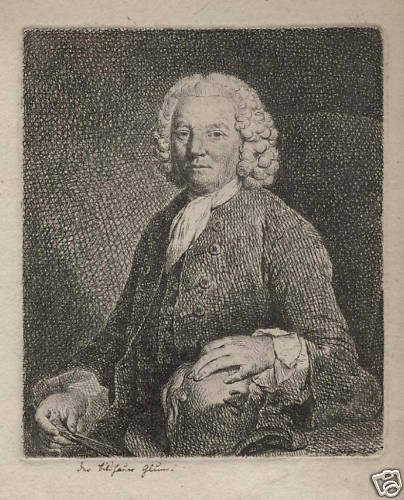 Bildhauer Johann Georg Glume (1679-1767), Radierung, 158 x 133 mm